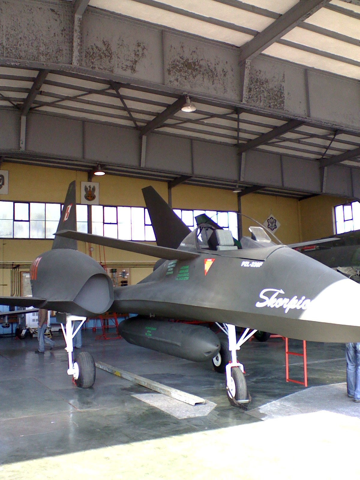 Makieta samolotu PZL-230 Skorpion